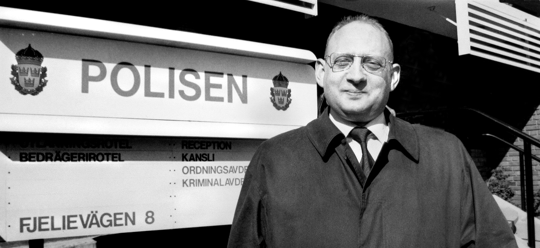 Lars Hultén på väg till Lundapolisen för att söka demonstrationstillstånd för 30e Novemberförningen 1992.